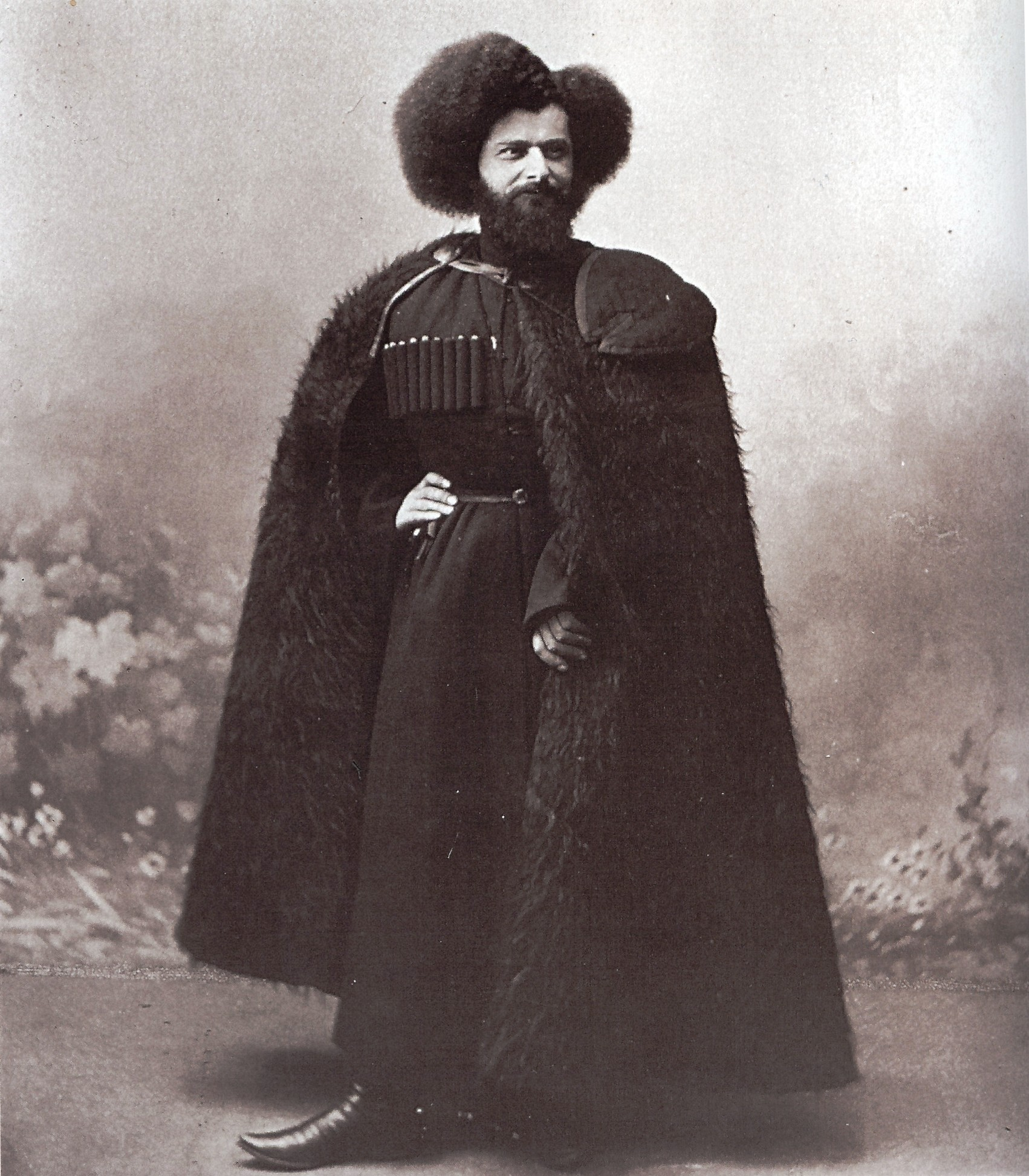 Portrait du noble caucasien d'Imeretie Ovalyani, pris dans le studio du photographe Ermakov. Tbilissi vers 1890. Ermakov